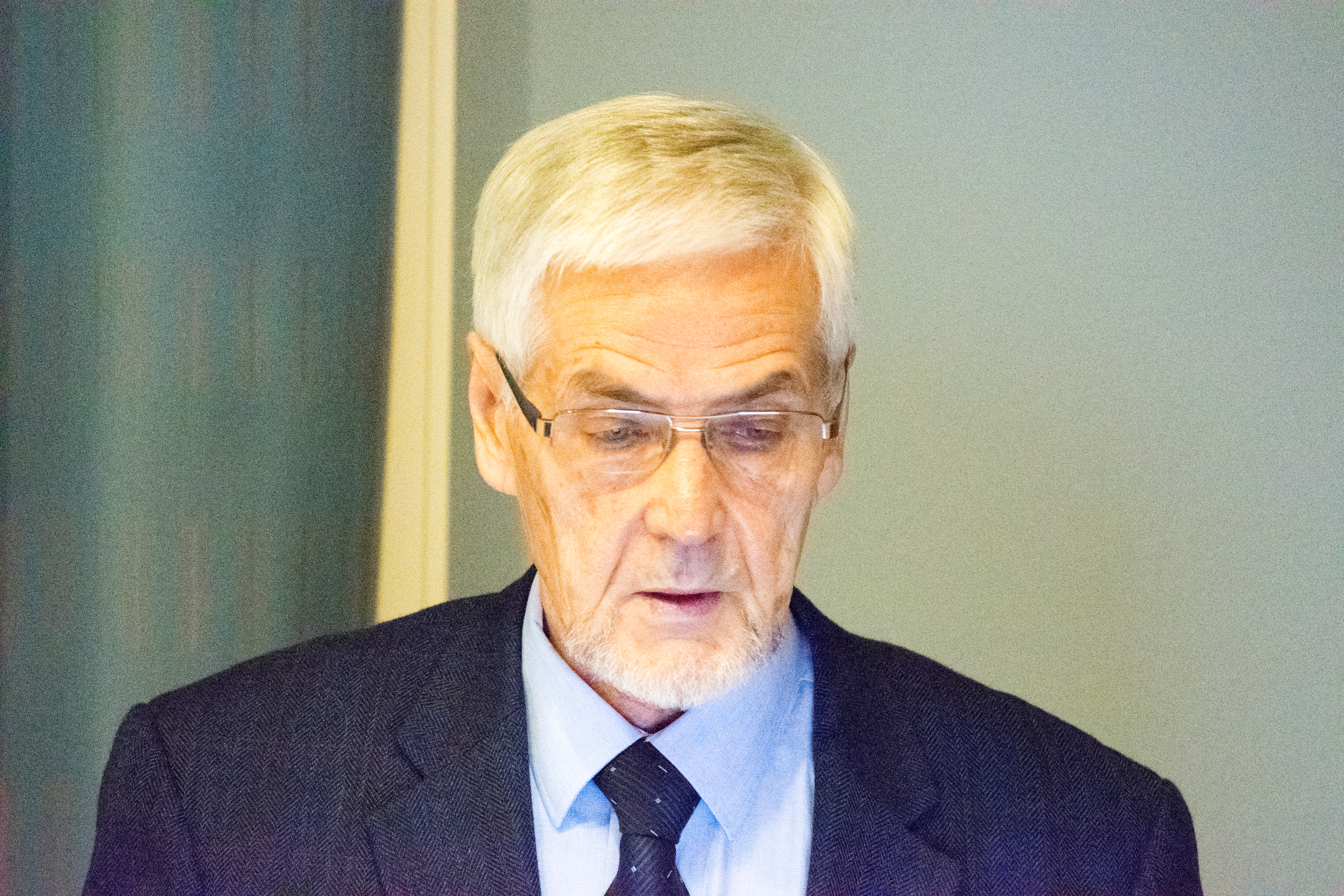 Mikko uola suomalainen kirjailija